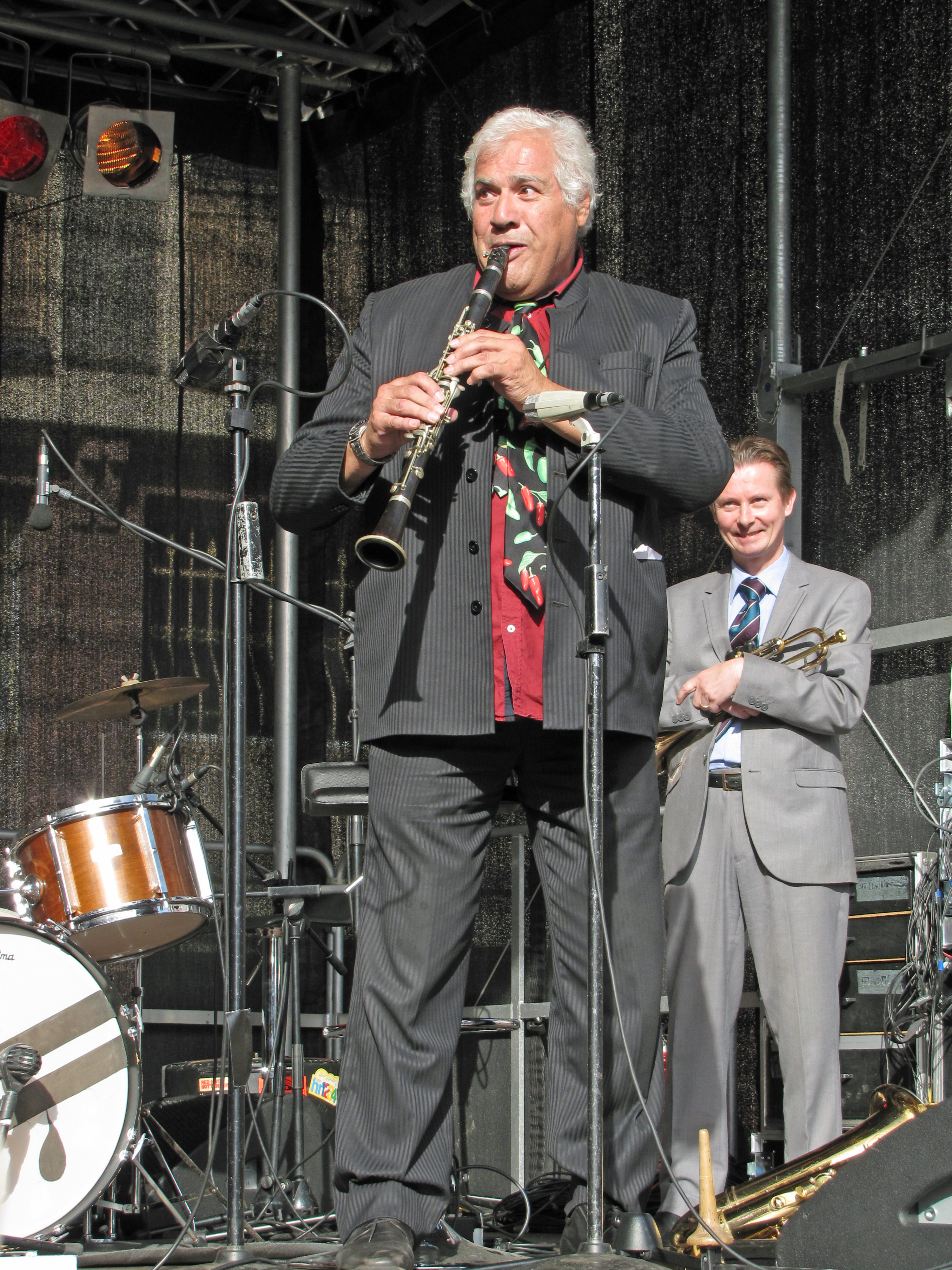 Wilson de Oliveira von den "Red Hot Hottentots", bei "Jazz zum Dritten" 2013, auf dem Römerberg in Frankfurt am Main. Im Hintergrund: Colin T. Dawson